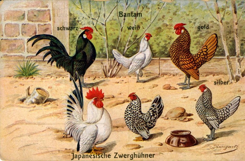 Hühnerrassen von Jean Bungartz, lithographische Ansichtskarte (Nr. 1017), Sammlung Frank Bartsch Bliesheim